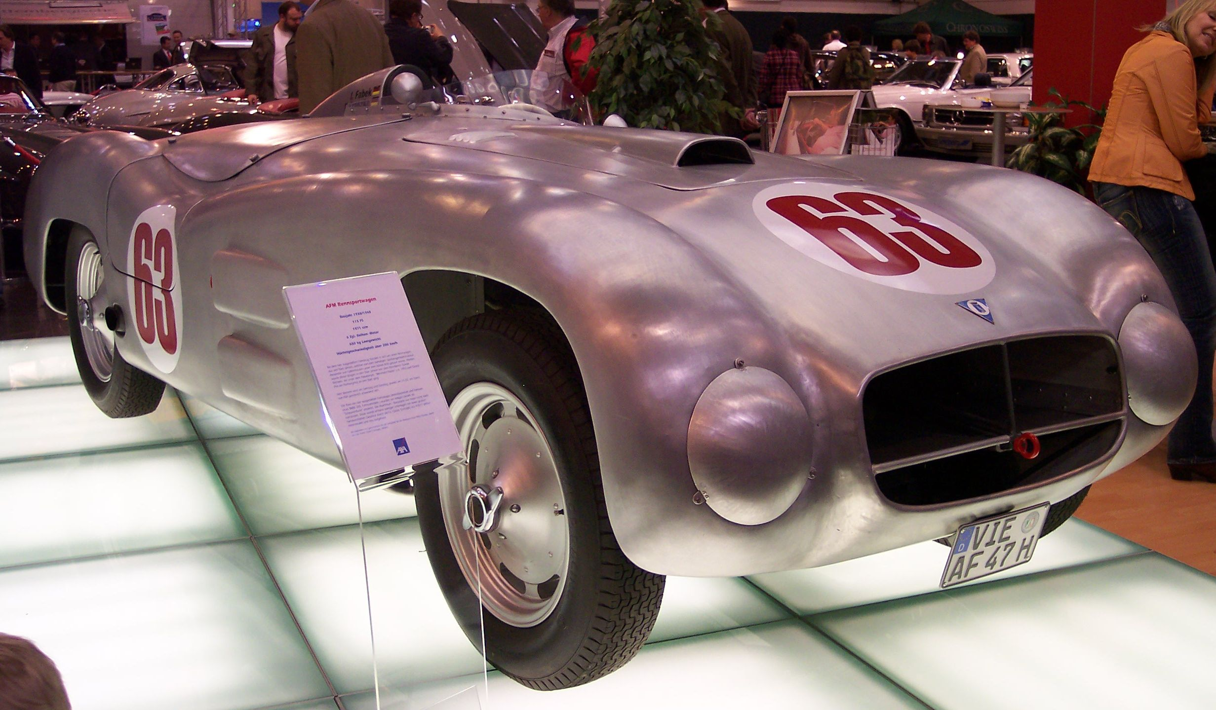 Alex von Falkenhausen Motorenbau racecar, based on a BMW 328